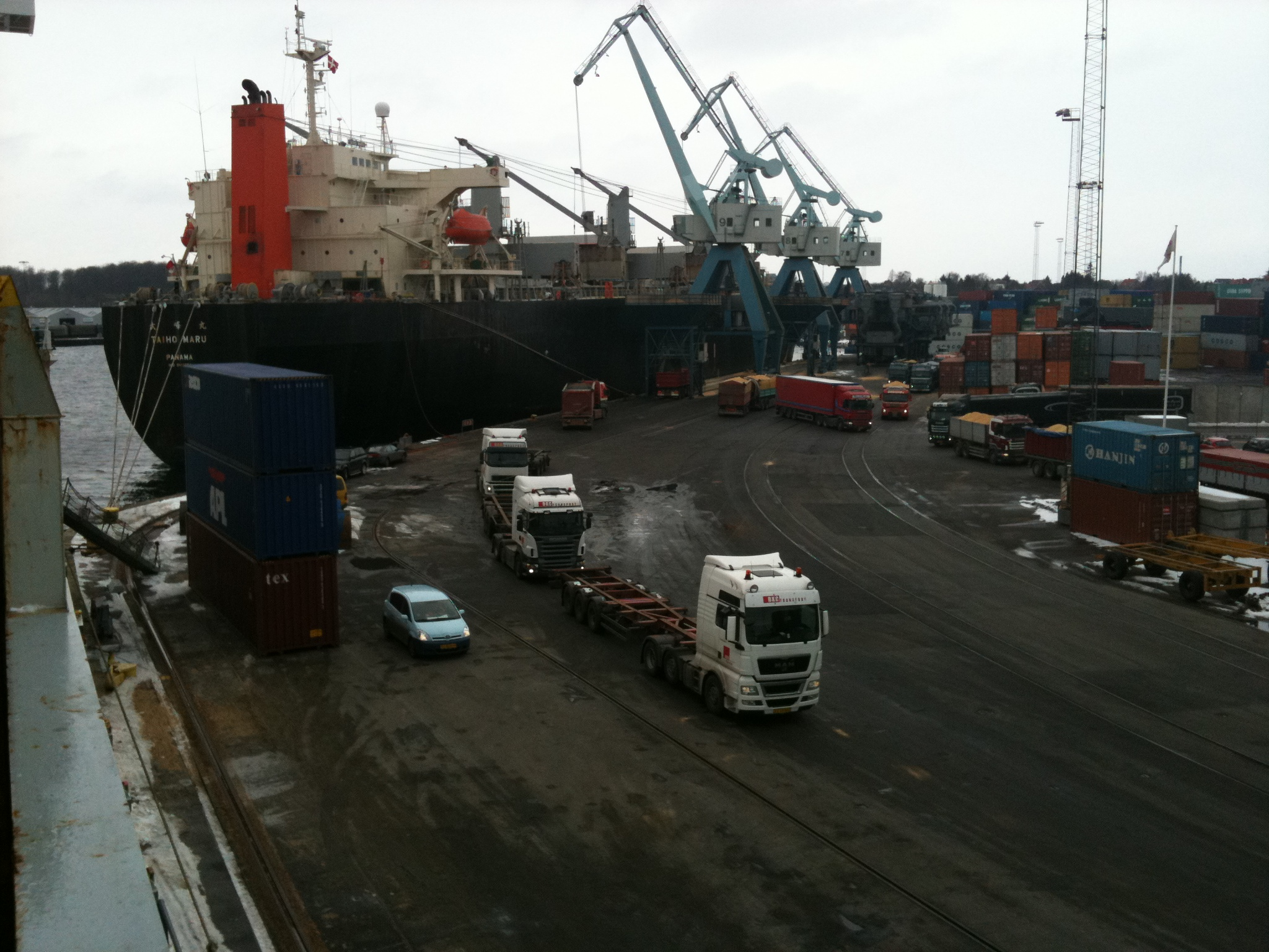 Fredericia Havn, set fra et containerskib, mens der er et stort tør-bulk skib i havn.